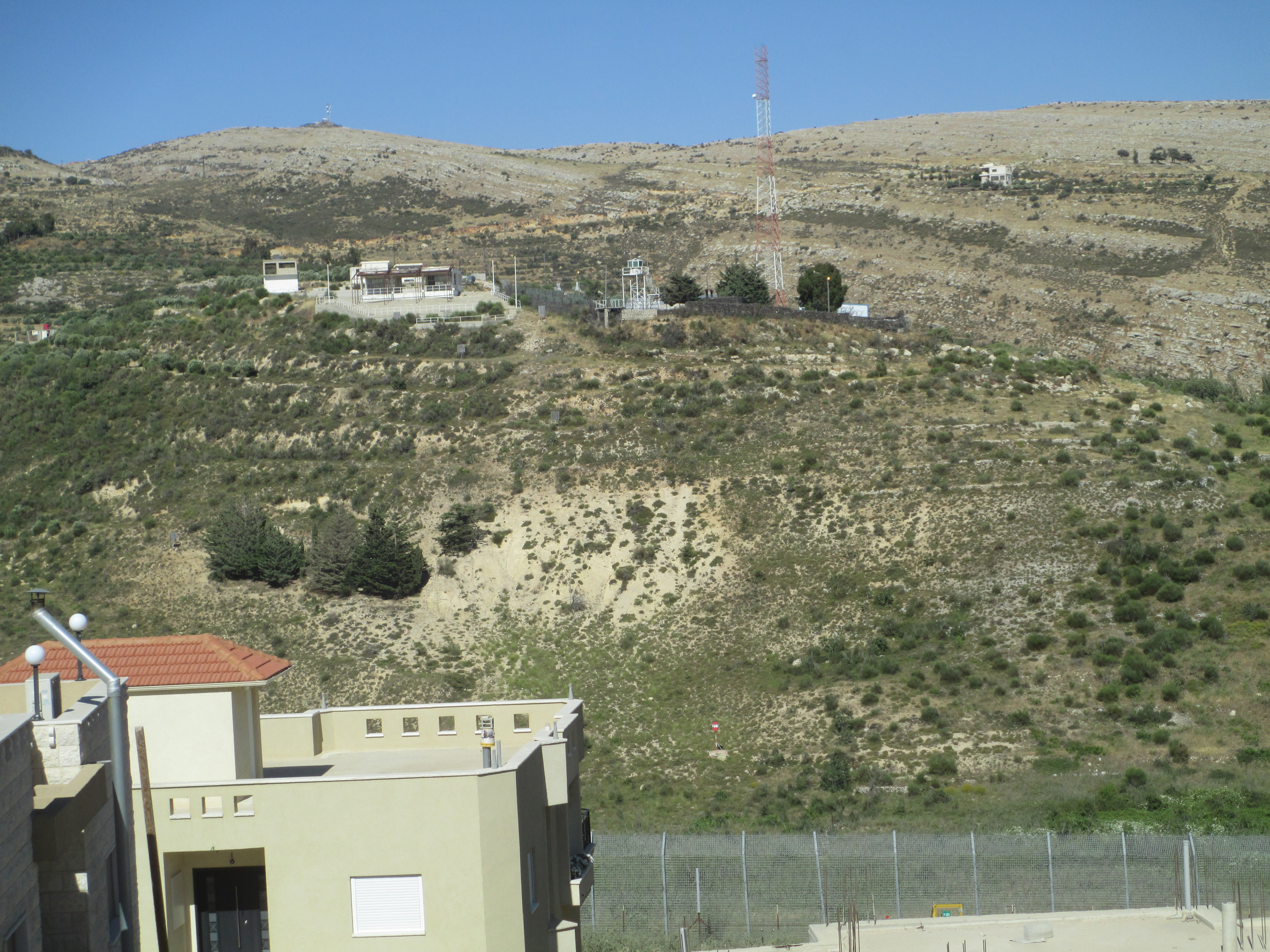 גבעת הצעקות ליד מג'דל שמס